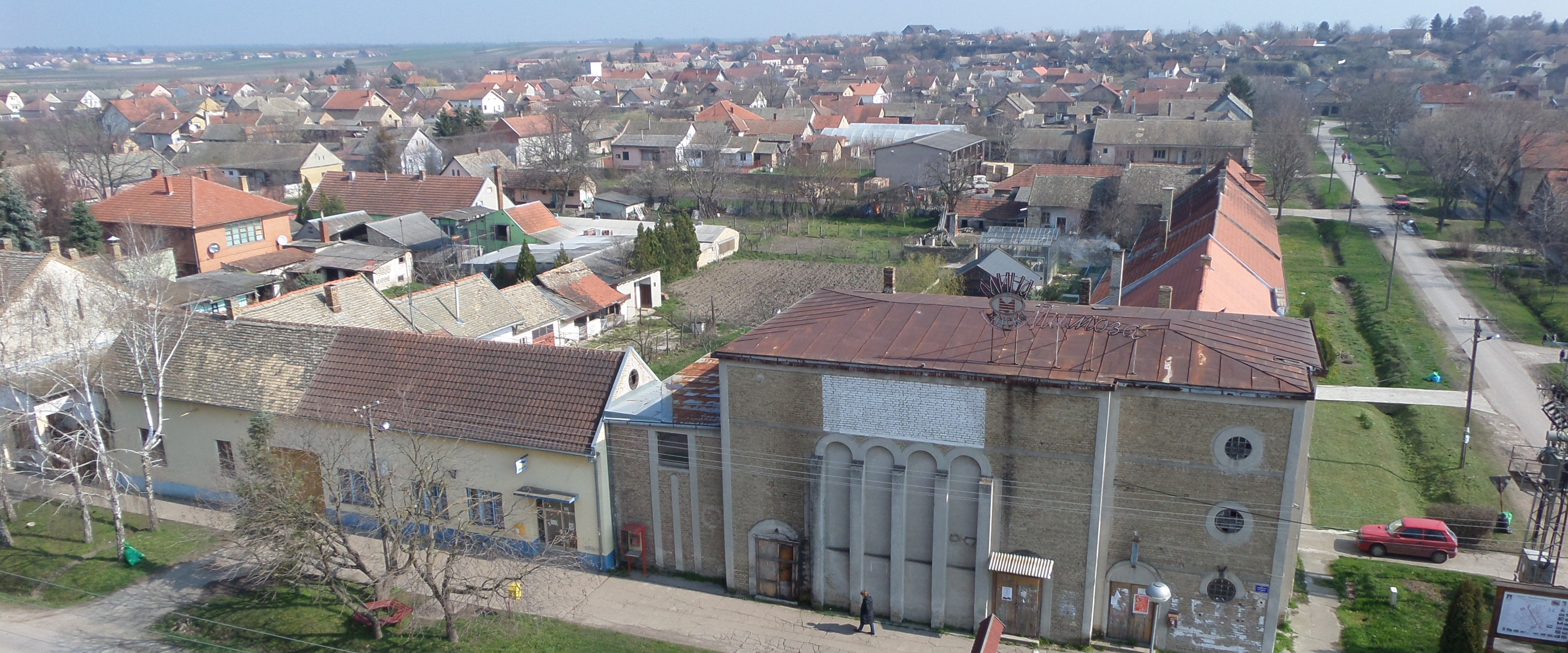 2016.03.17._ Bácsfeketehegy_Feketić_Feketitsch